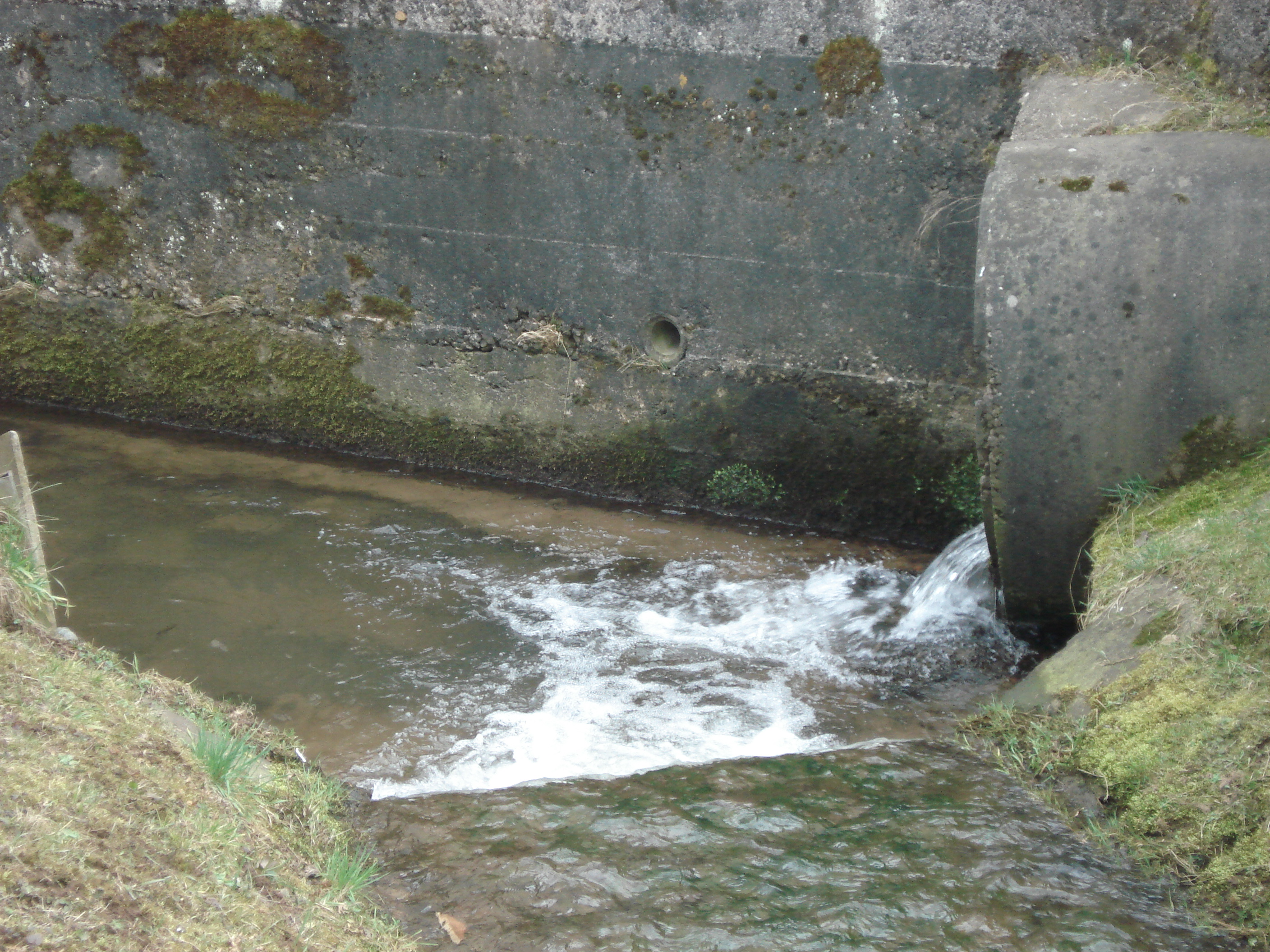 Der Hombach (rechts) mündet in den Westerbach